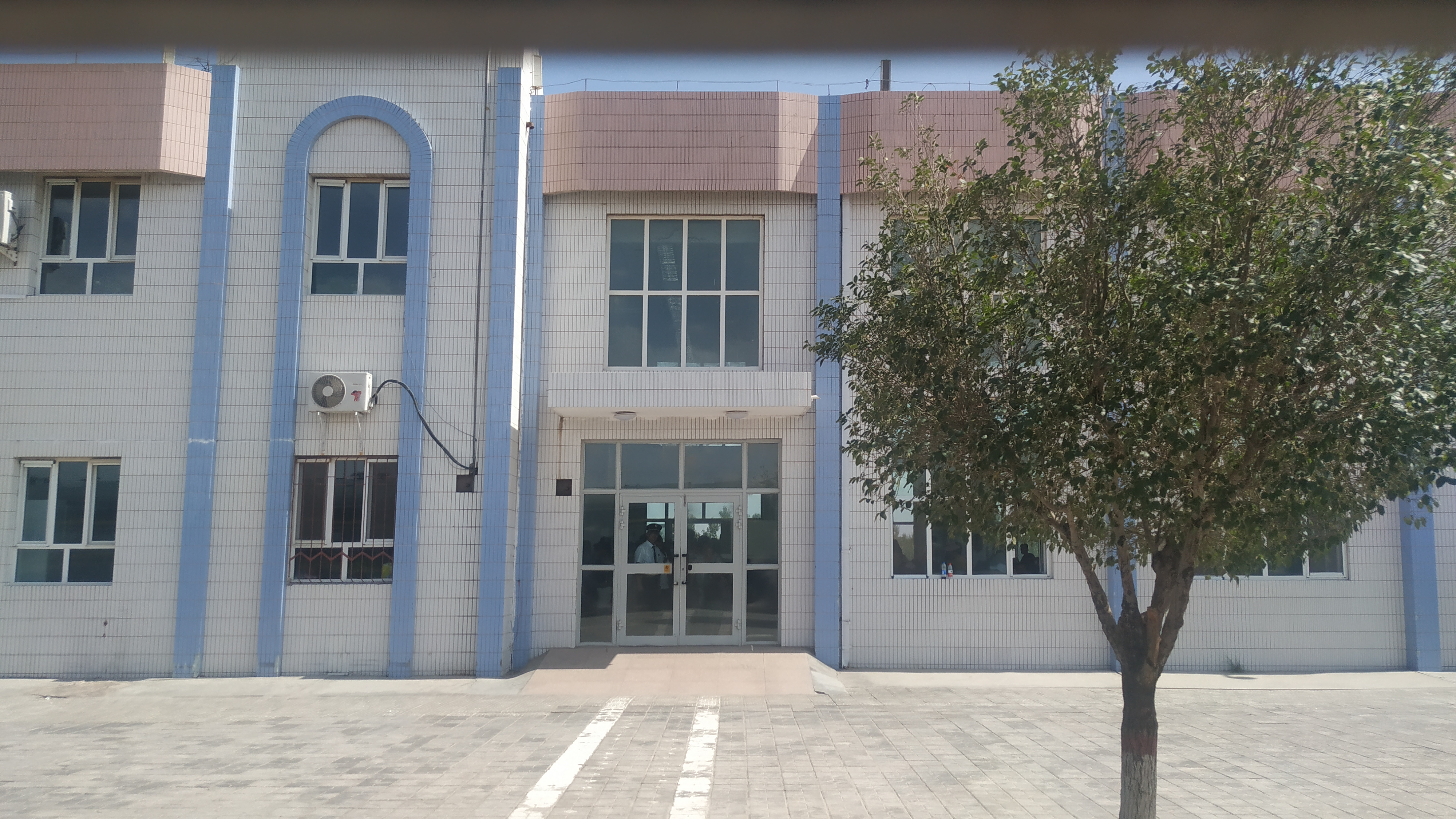 中文（中国大陆）: 巴楚站站房